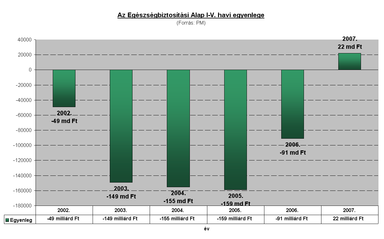 Az Egészségbiztosítási Alap I-V. havi bevételeinek és kiadásainak egyenlege 2002-2007 (milliárd Ft-ban)